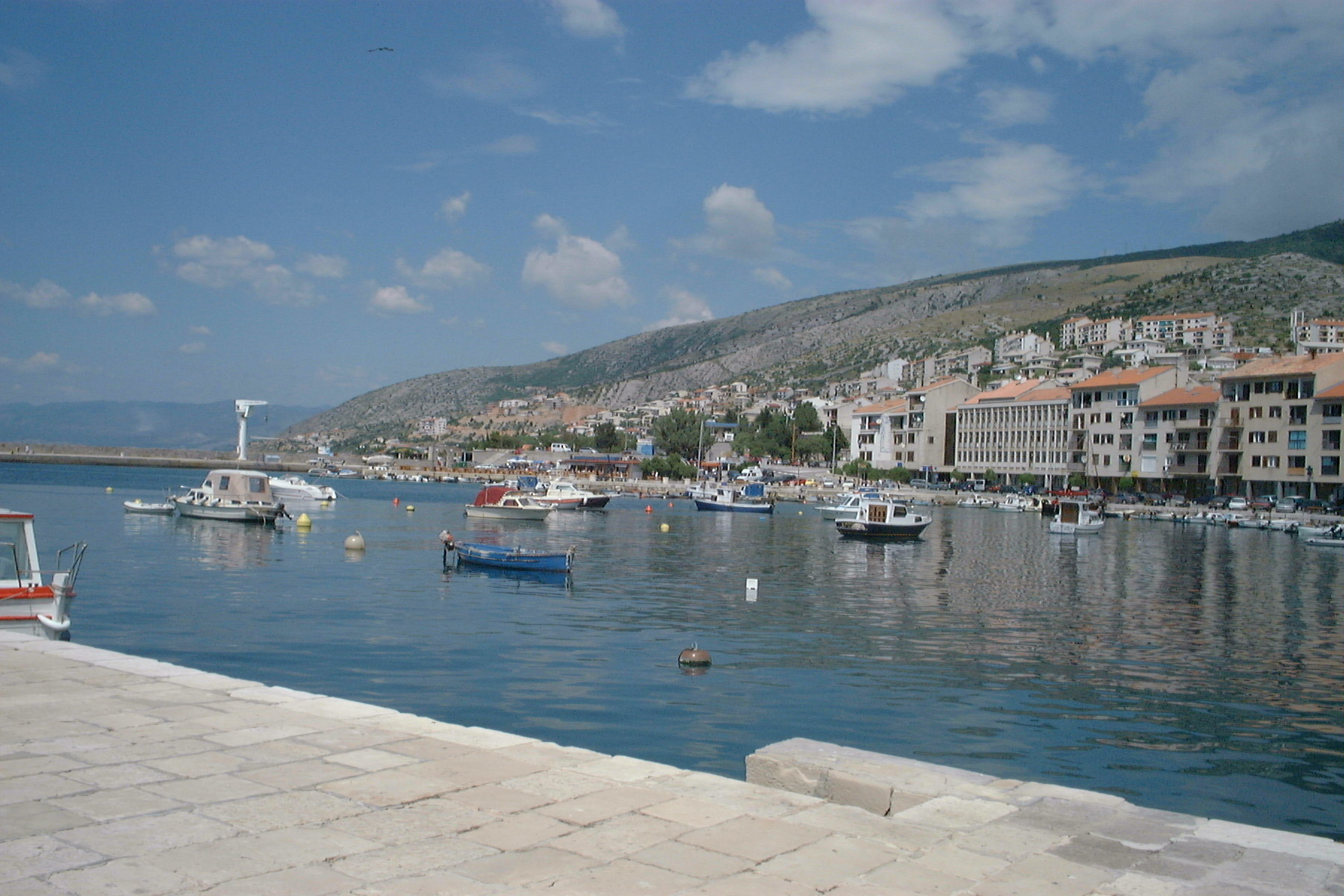 Senj, en Croatie vue du port Date : Aug. 2005 Source: personal photo